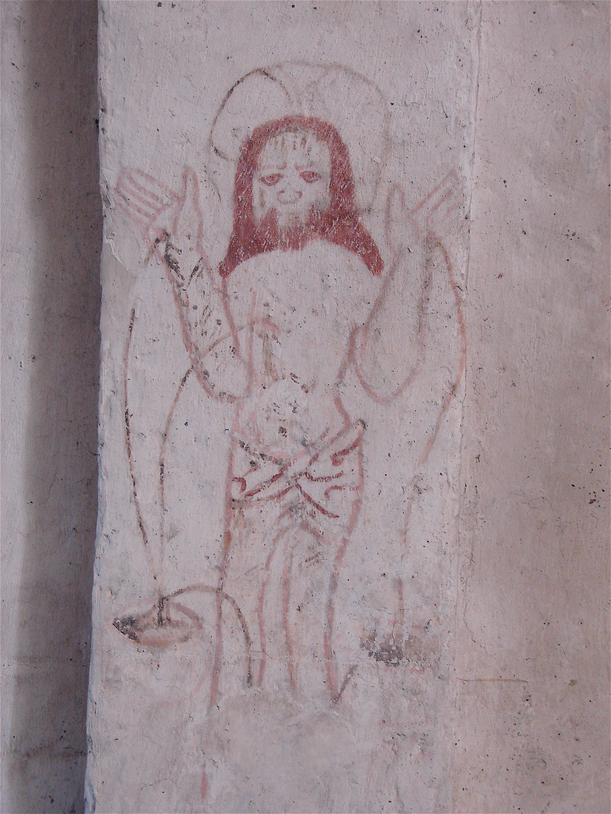 Båstad kirke, Bådsted, kalkmaleri